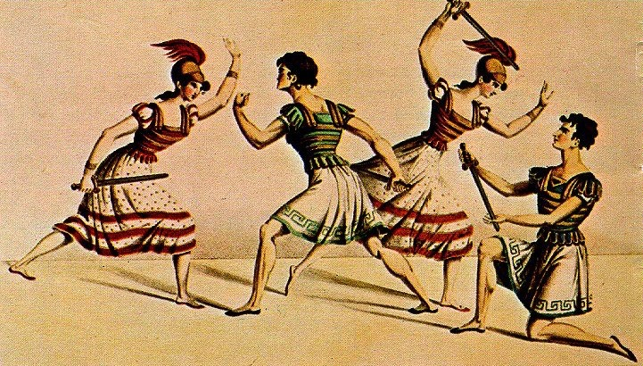 "Ballett Schwerdt und Lanze. Mlle Pierson, Hr. [Paolo] Taglioni [1808–1884], Mlle [Maria] Taglioni [1804–1884], Hr. Stullmüller als Amazonen und griechische Fechter." Farblithografie 1826.